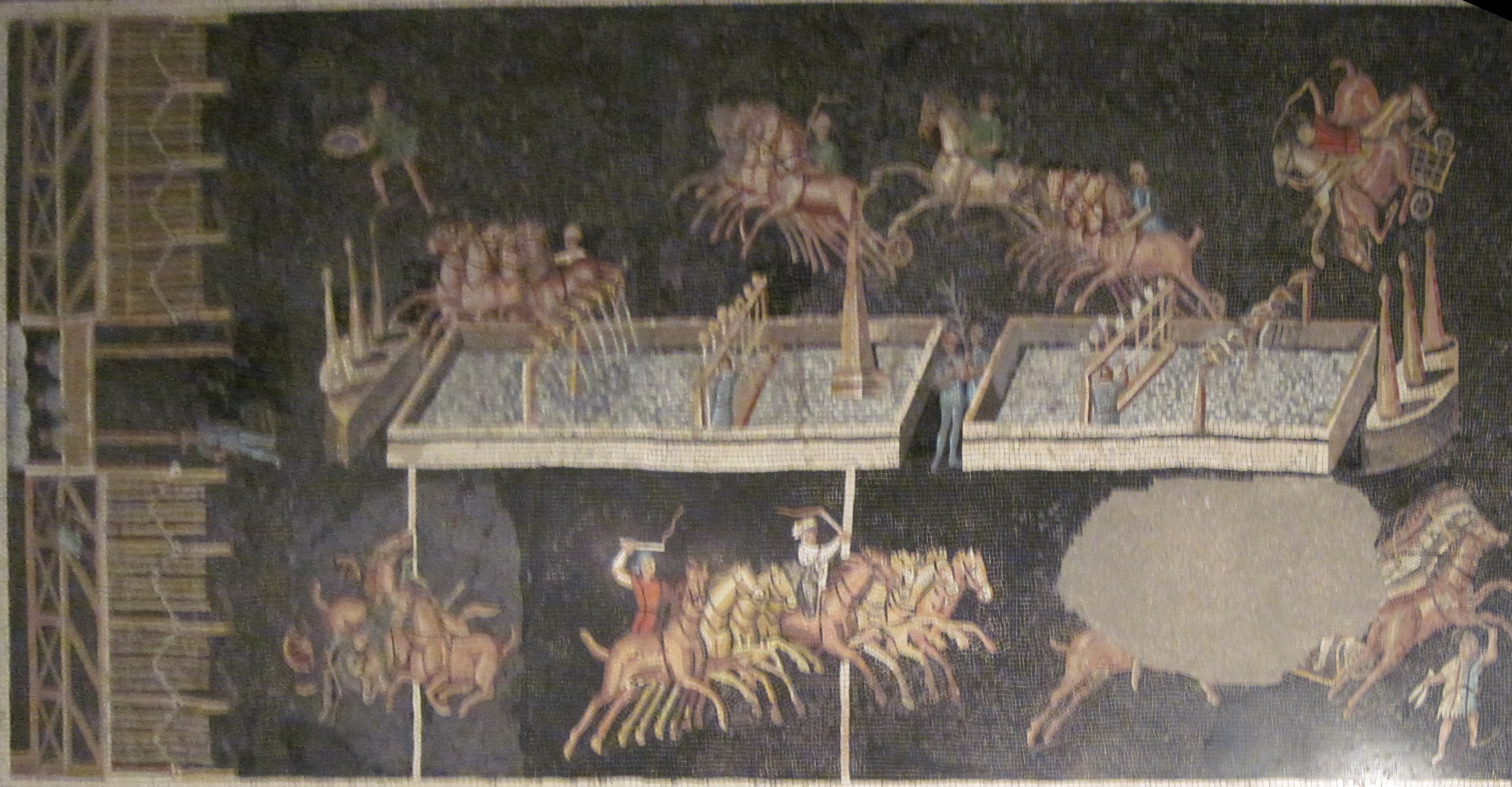 Interlingua: Le quatro equipas (blau, verde, blanc, rubie) al circo. Mosaico trovate a Lyon (rue Jarente) in 1806.